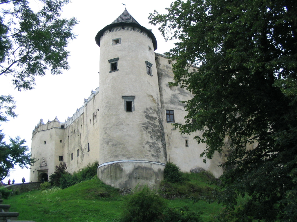 Zamek Niedzica